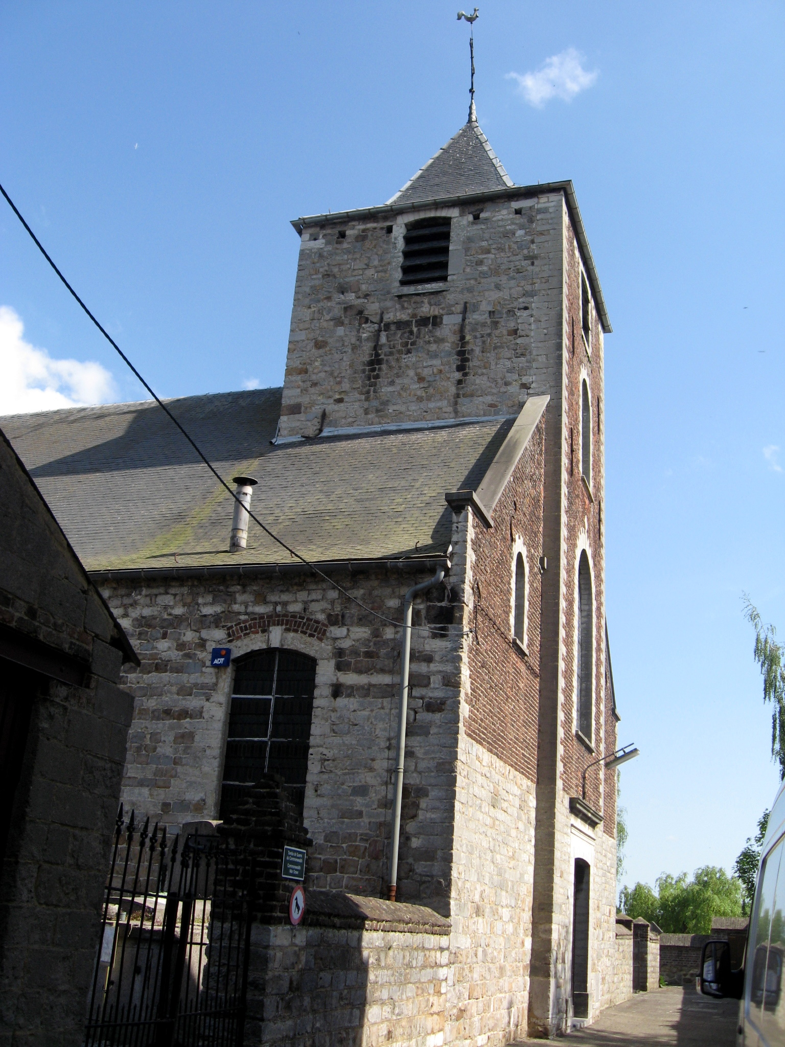 Maria-Visitatiekerk in Autre-Eglise